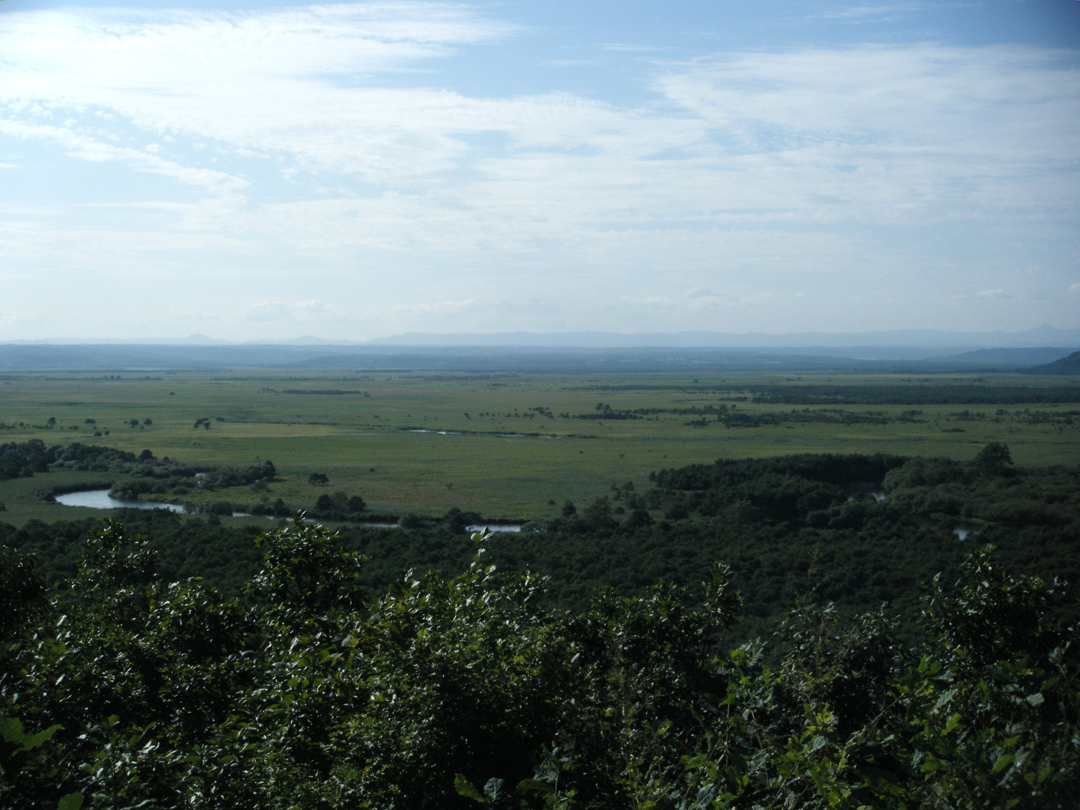 細岡展望台からの釧路湿原（北海道釧路市）